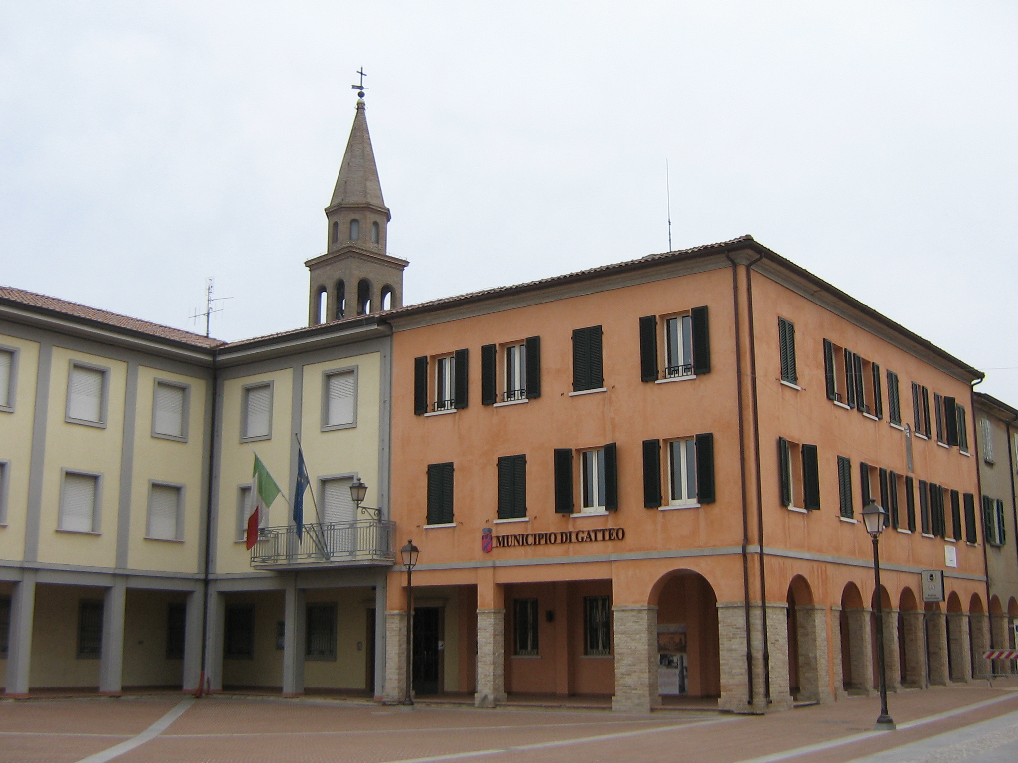 Municipio di Gatteto (FC), Italy